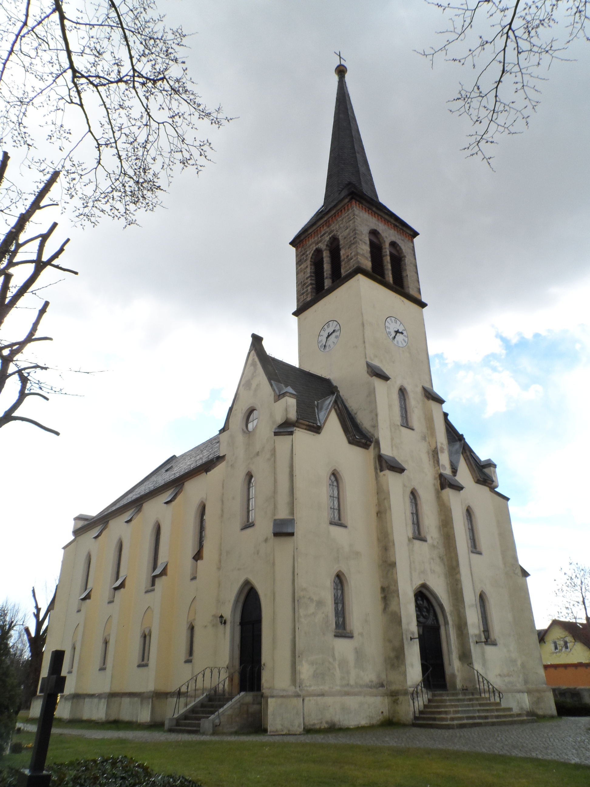 Kirche